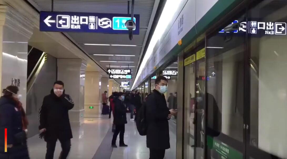 1月22日，武汉市宣布封城，地铁于10时发出末班车